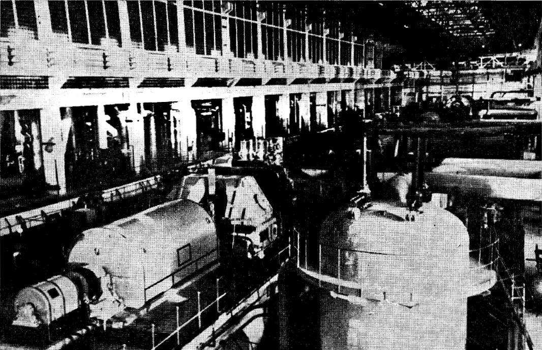 Vedere din sala mașinilor a CET Borzești, cu instalaţiile de termoficare.